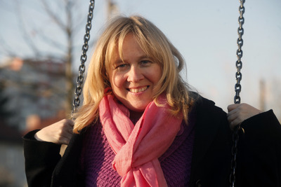 Dr. Sonja Merljak Zdovc